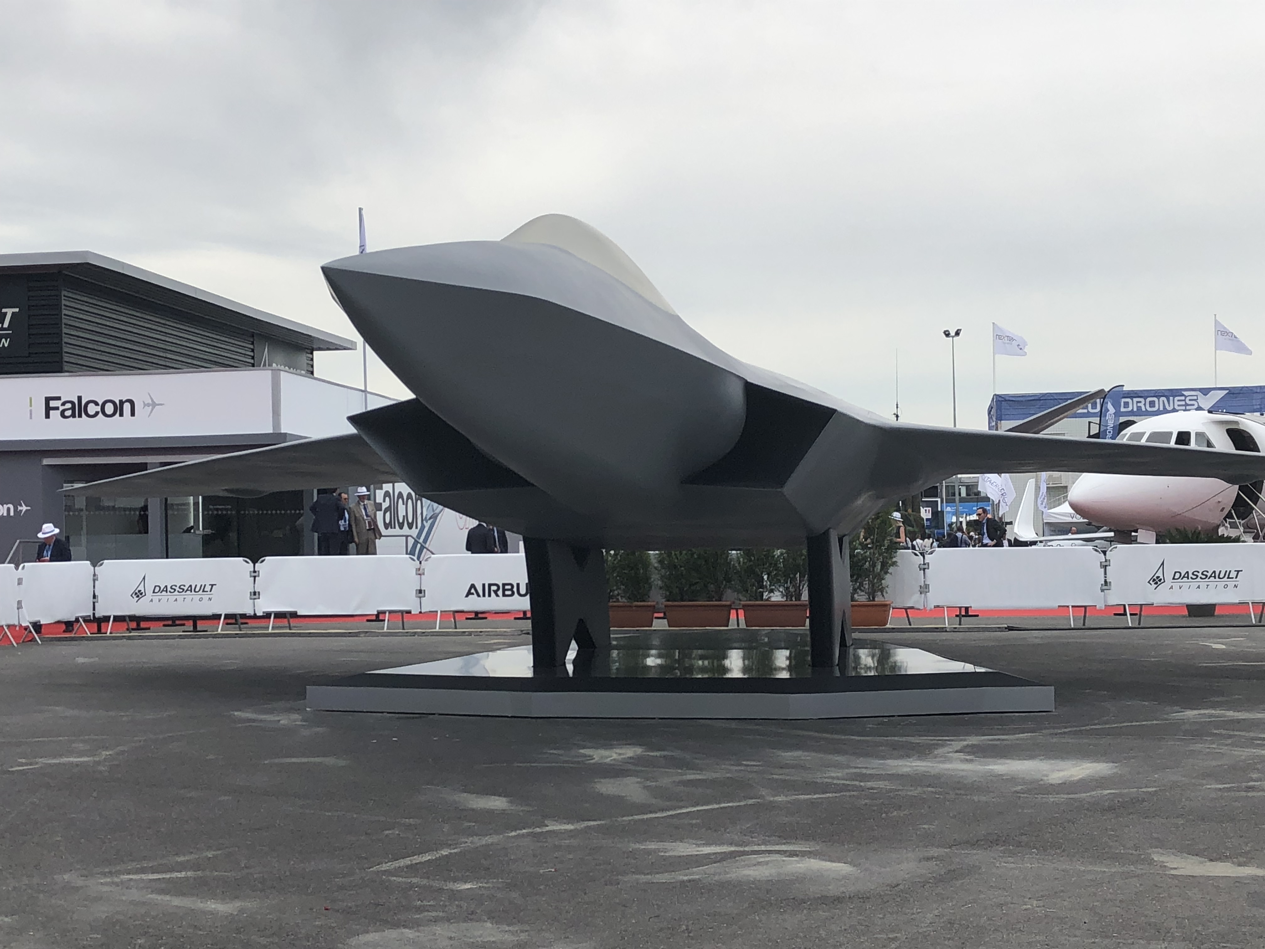 Maquette du Système de Combat Aérien du Futur européen, dévoilée au salon du Bourget 2019